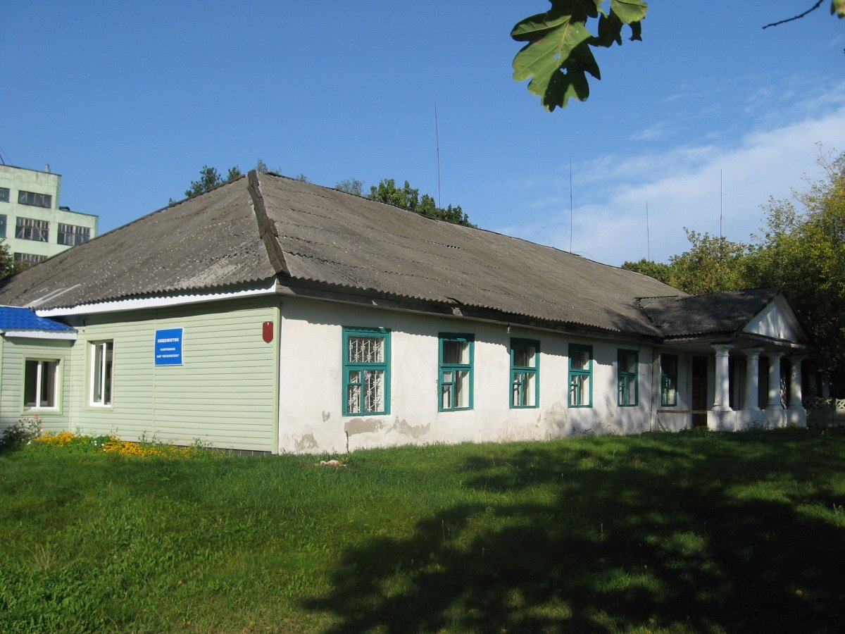 Пескі. Сядзібны дом